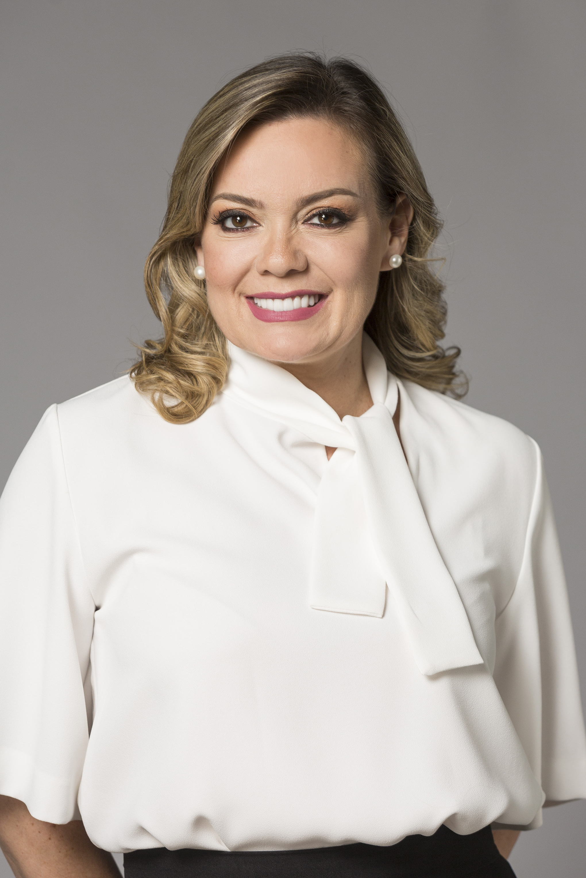 CONCEJAL DE GUAYAQUIL 2019